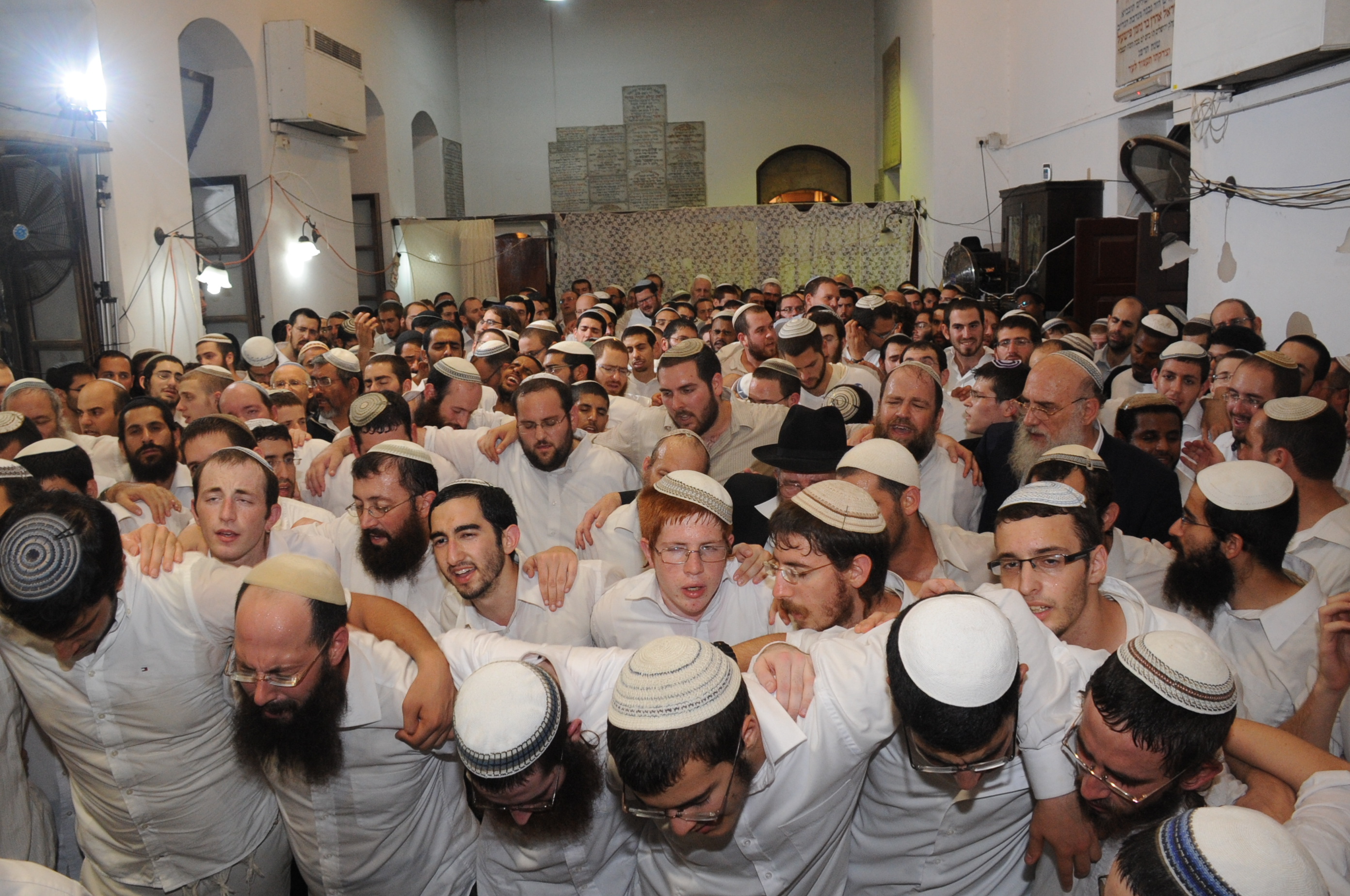 ריקודים בבית הרב קוק